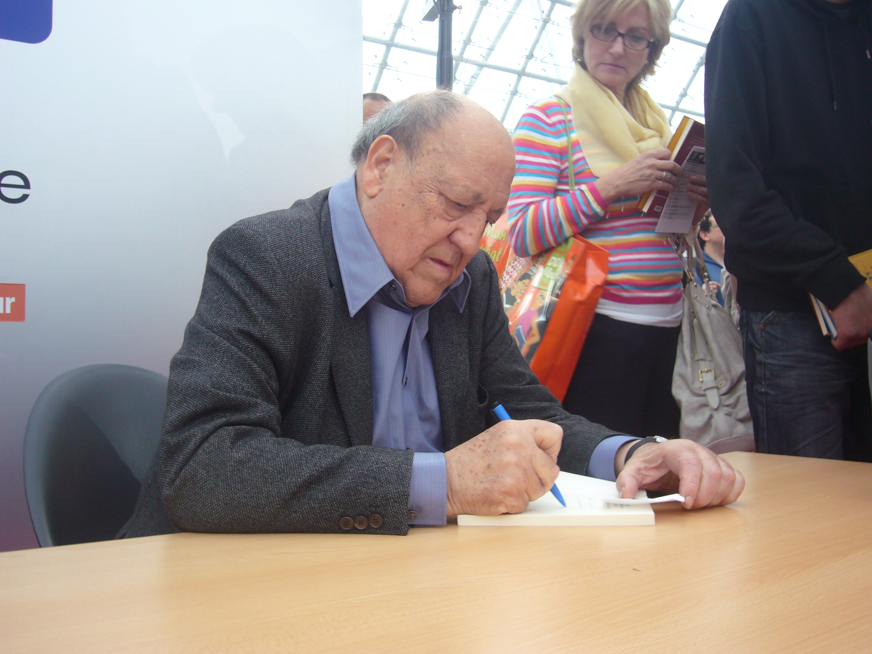 Javier Tomeo firmando libros en una feria. Aragonés: Javier Tomeo.